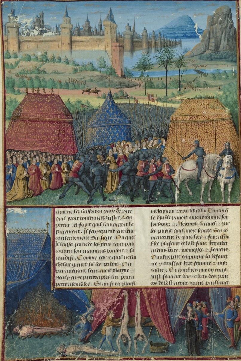 « Passages faiz oultre mer (...)SEBASTIEN MAMEROT 50v bohémond 1 simulant le cannibalisme